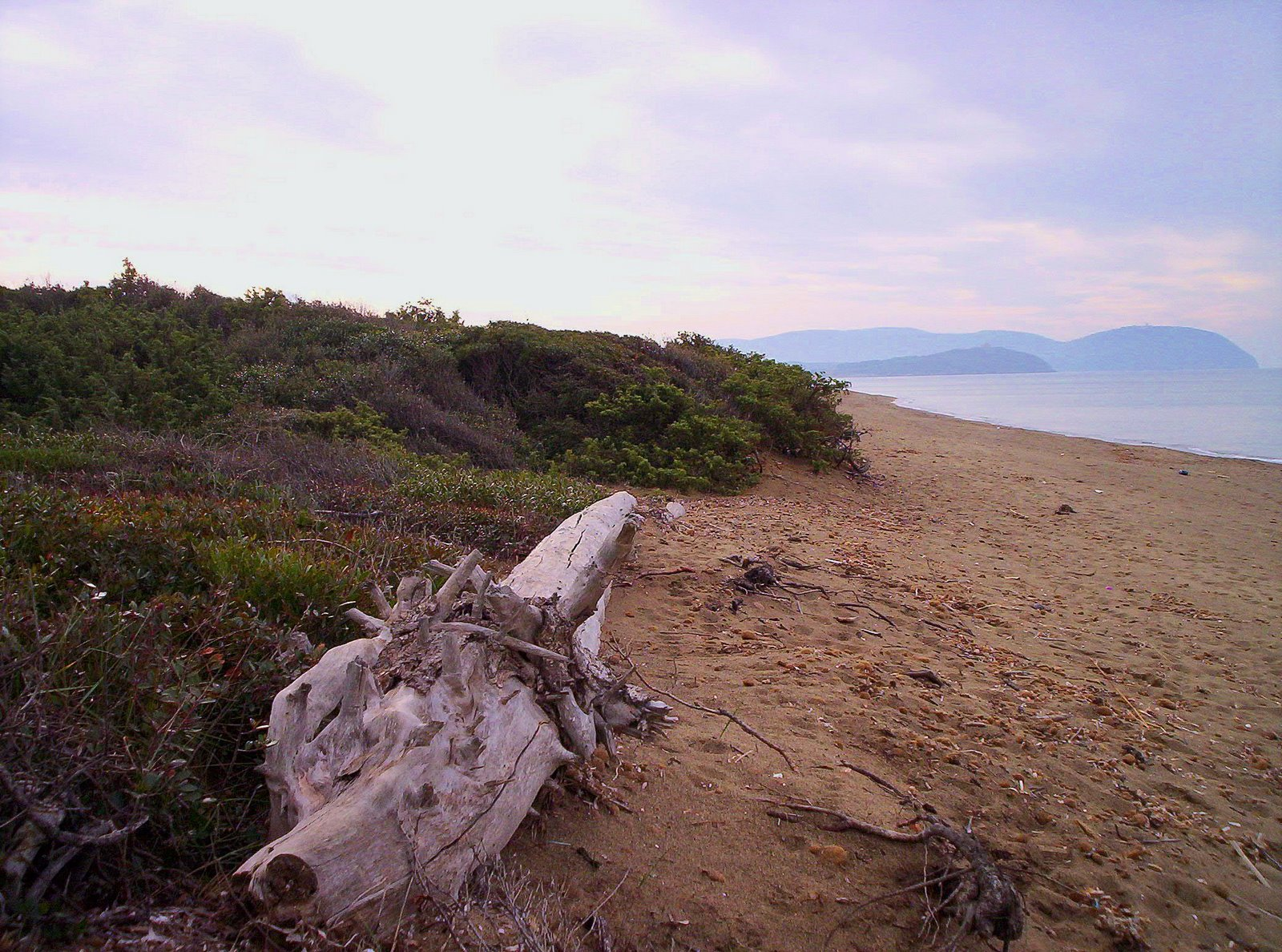 Rimigliano veduta